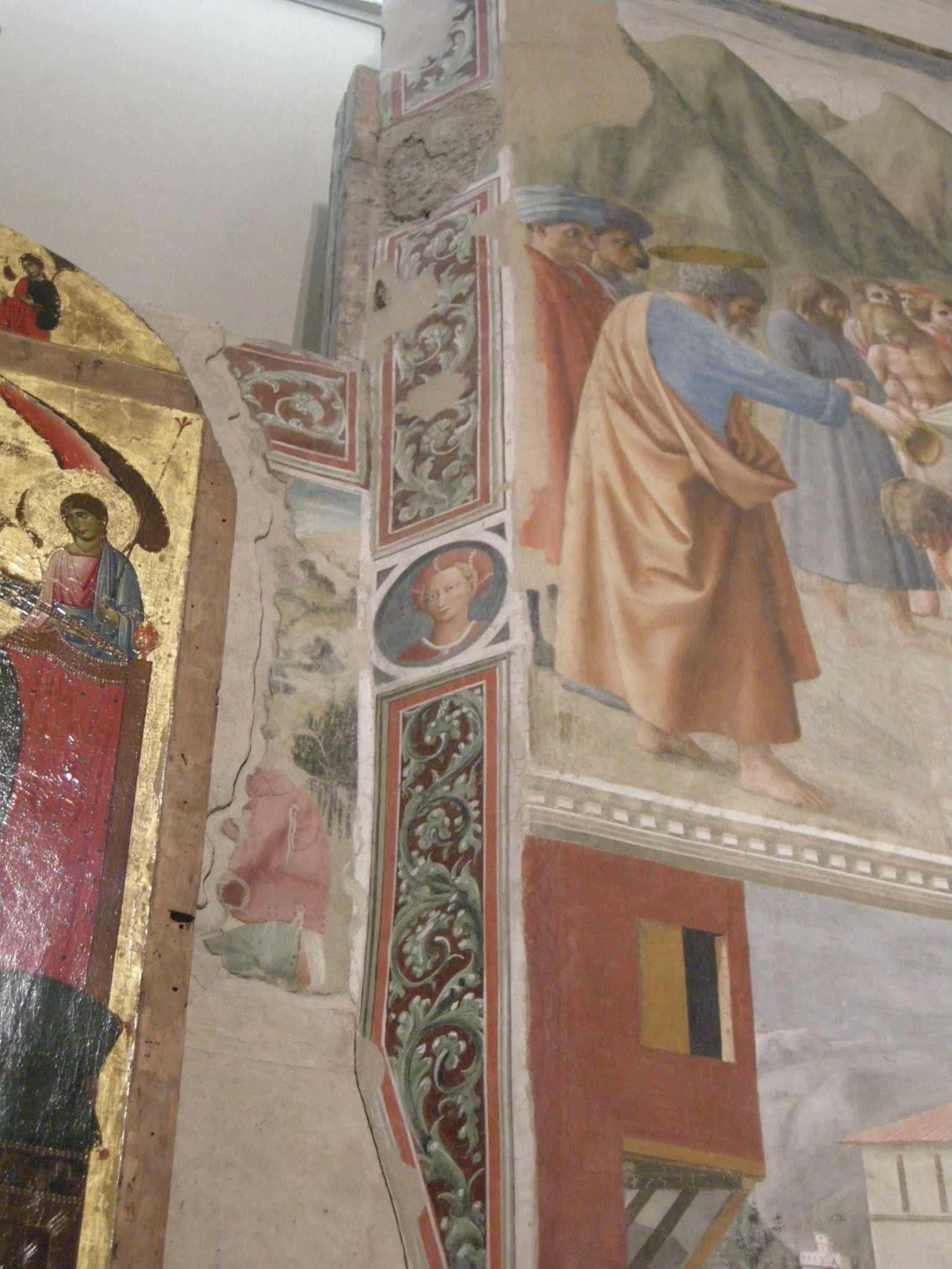 Cappella brancacci, testina